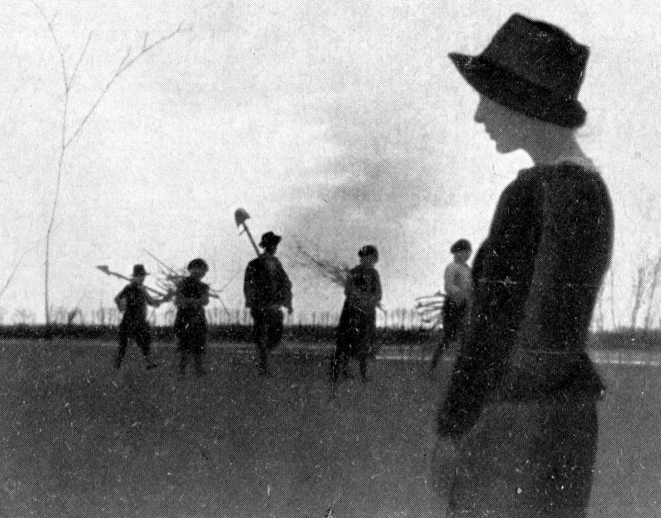 Fotogramma di Sole, regia di Alessandro Blasetti, prod Augustus, Roma, 1929